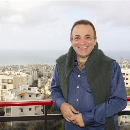 إالياس كرم